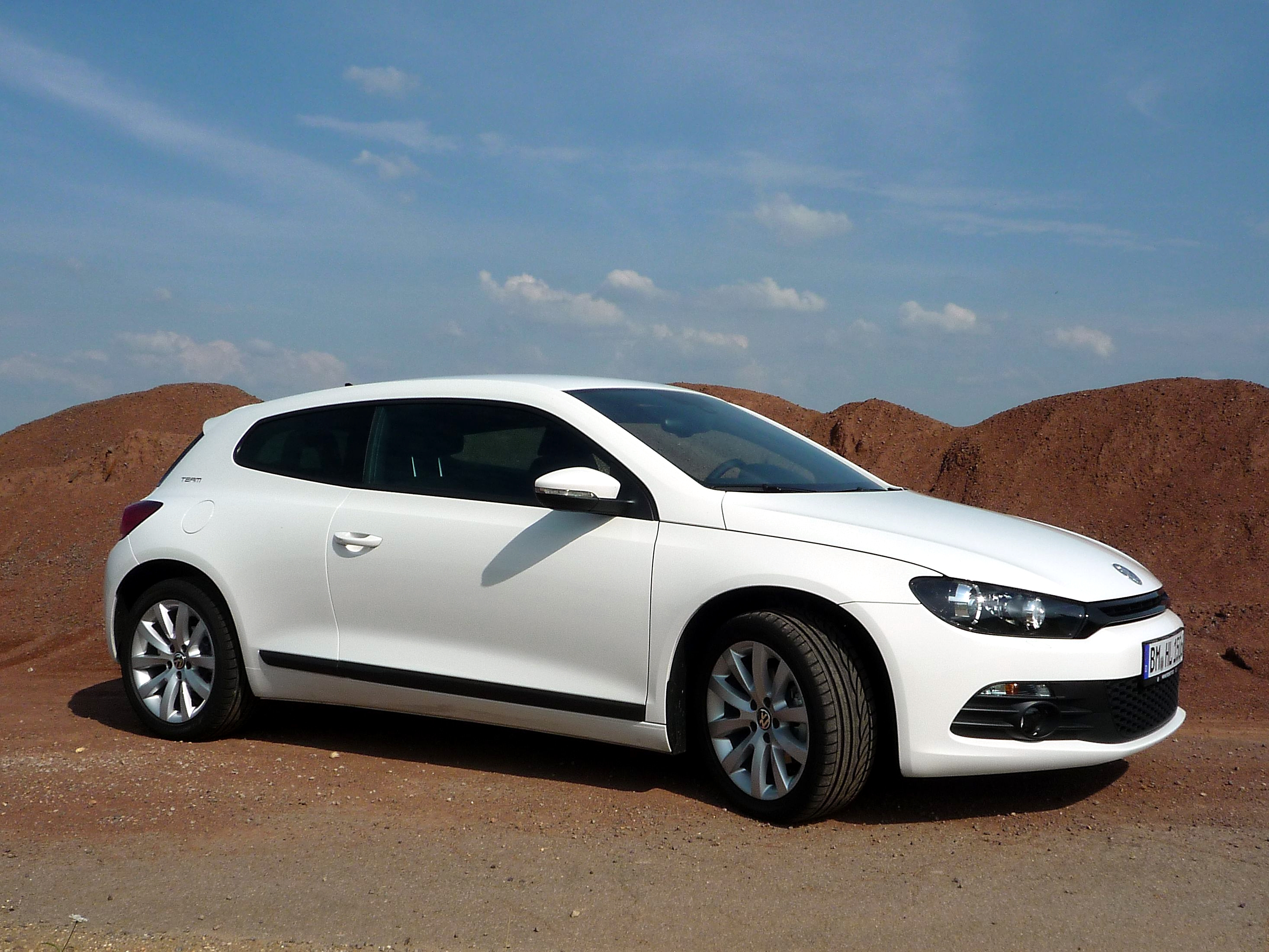 VW Scirocco Team Sondermodell 2010